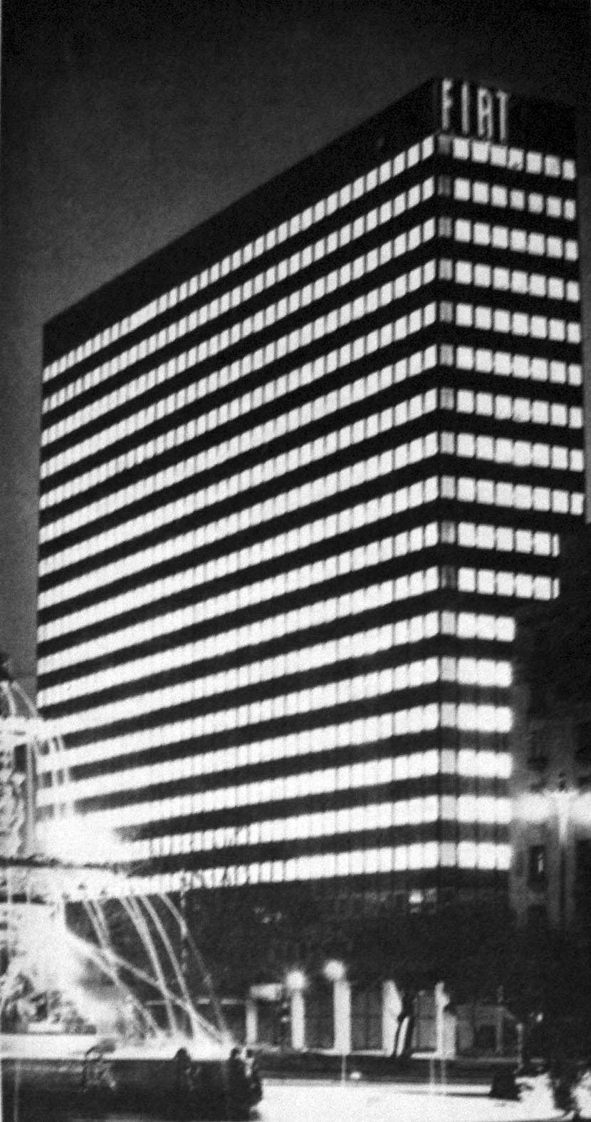 Vista nocturna del Edificio Fiat Concord, hoy Torre Mirafiori. Calle Cerrito, esquina Viamonte. Buenos Aires, Argentina.